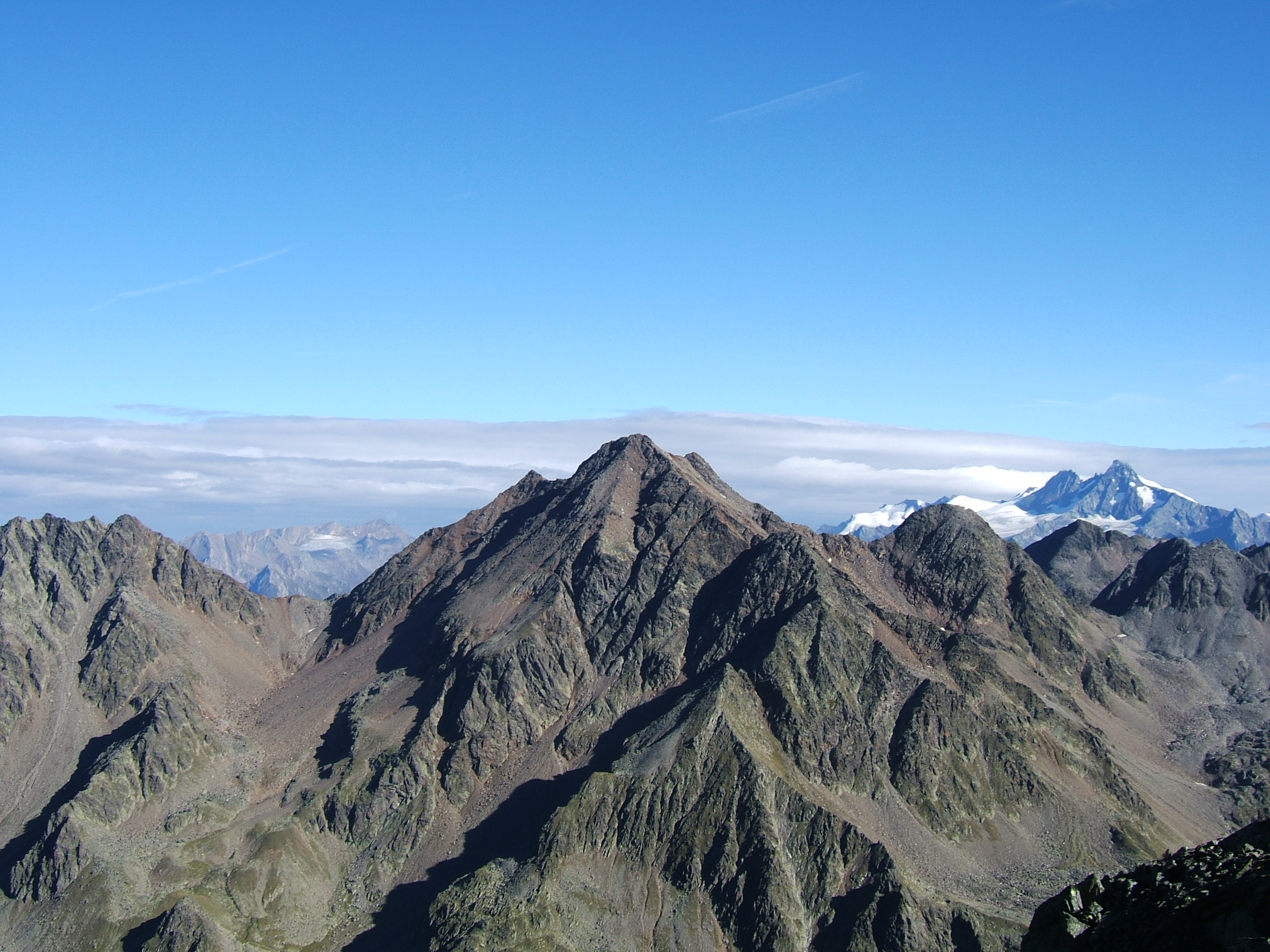 Hochschober von Süden, vom Hohen Prijakt. Rechts im Hintergrund Glocknerwand und Großglockner